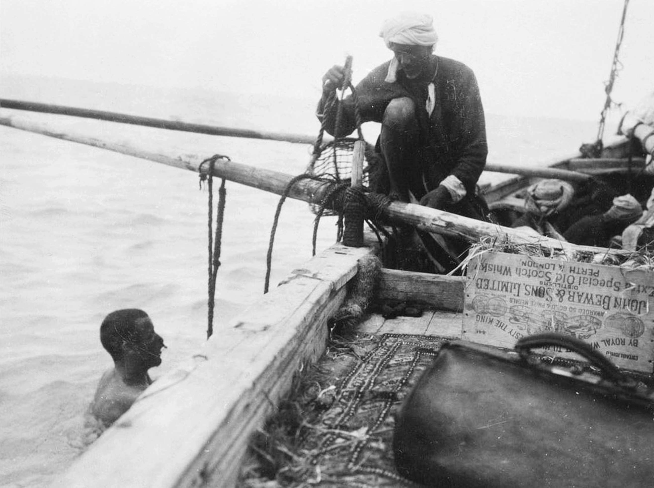 طوّاش في المحرق يستعد للغوص.